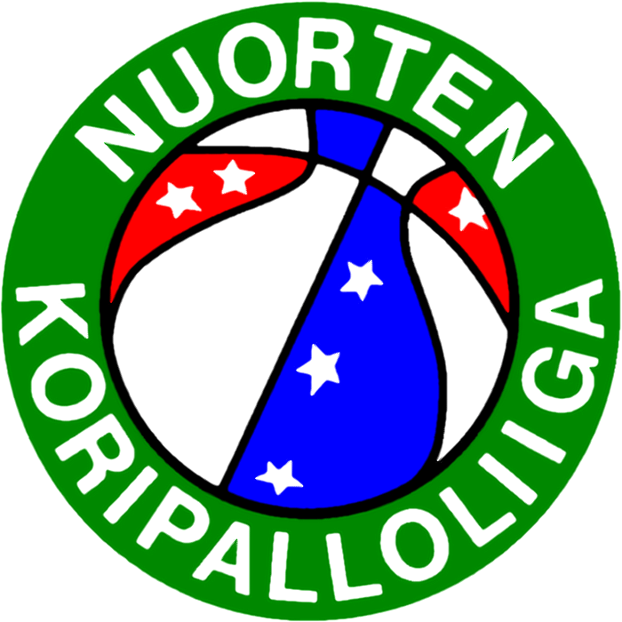 Nuorten Koripalloliiga -logo